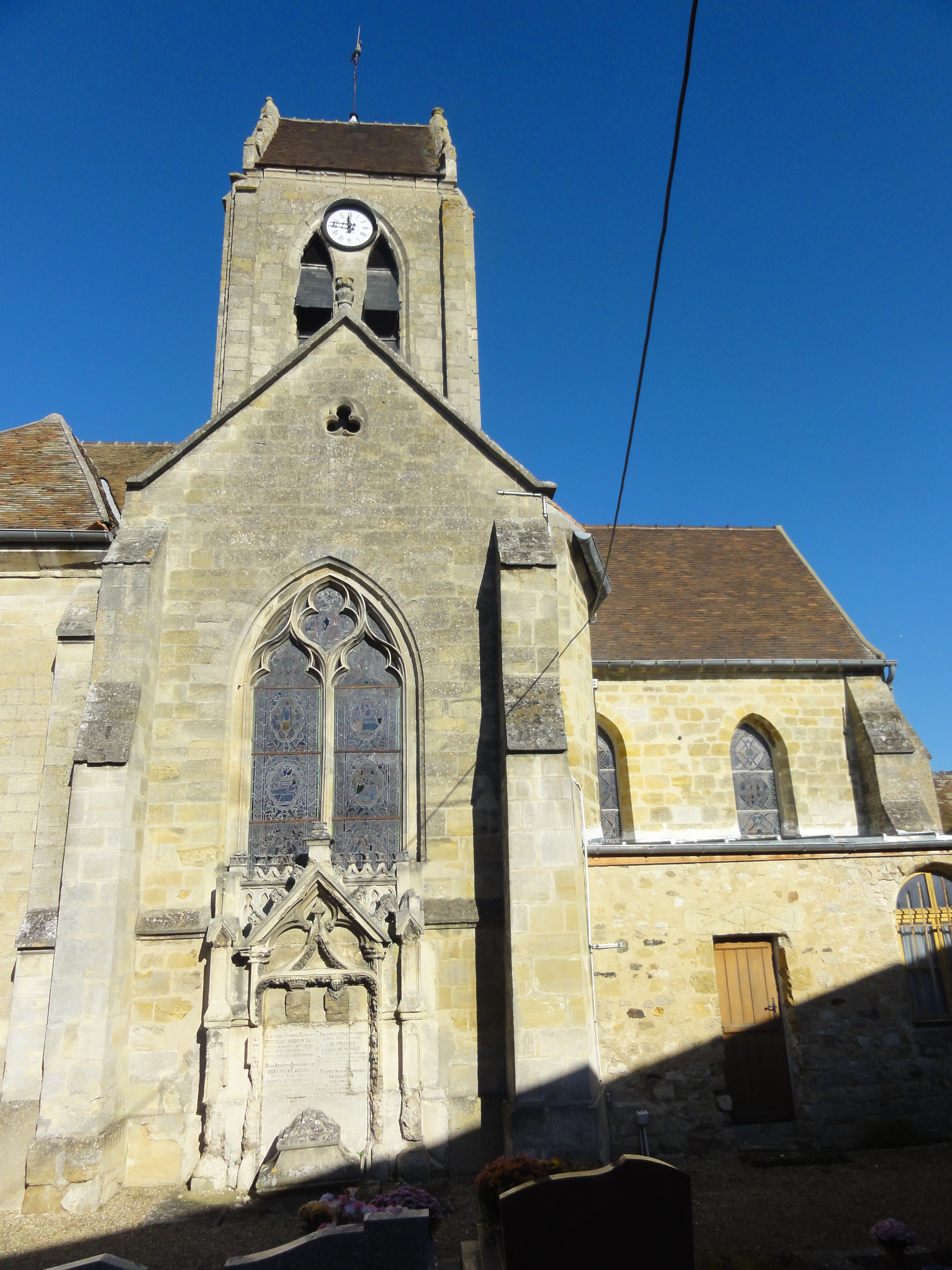 Église Saint-Pierre de Puiseux-Pontoise - voir titre.